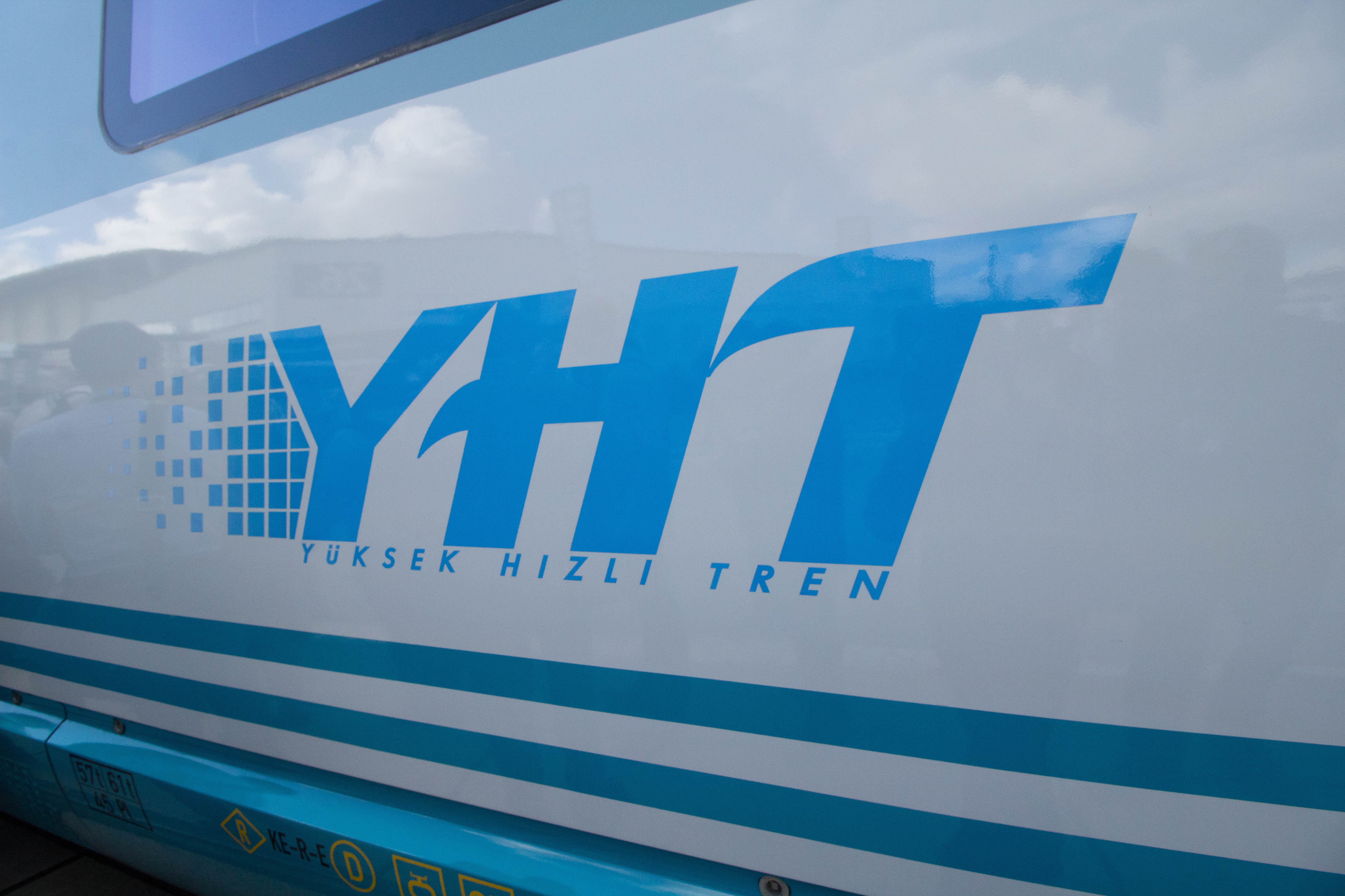 InnoTrans 2016 - TCDD HT 80000 - Siemens Velaro TR